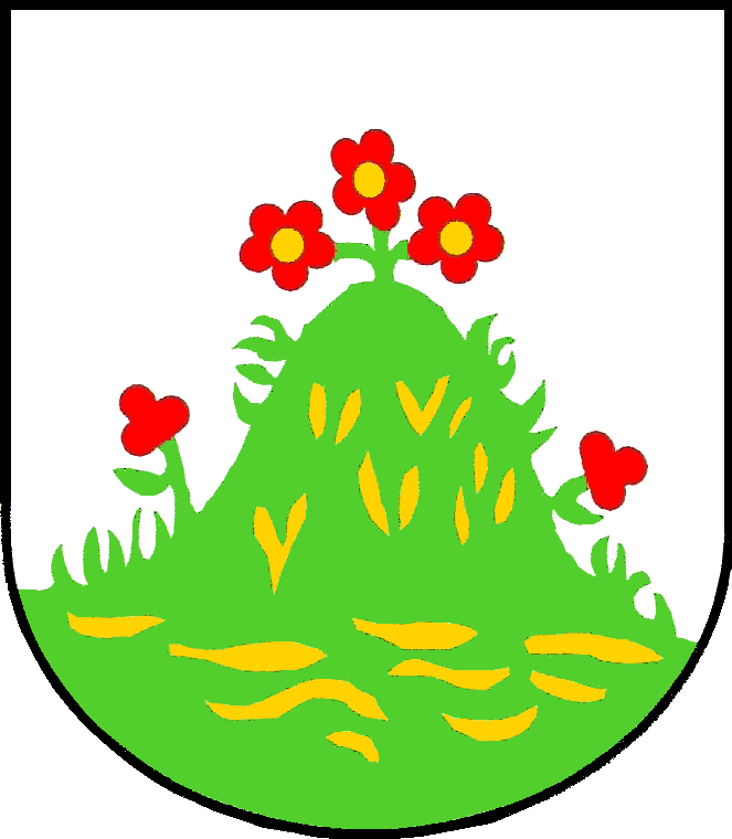 Herb Górek Małych w powiecie cieszyńskim, gminie Brenna